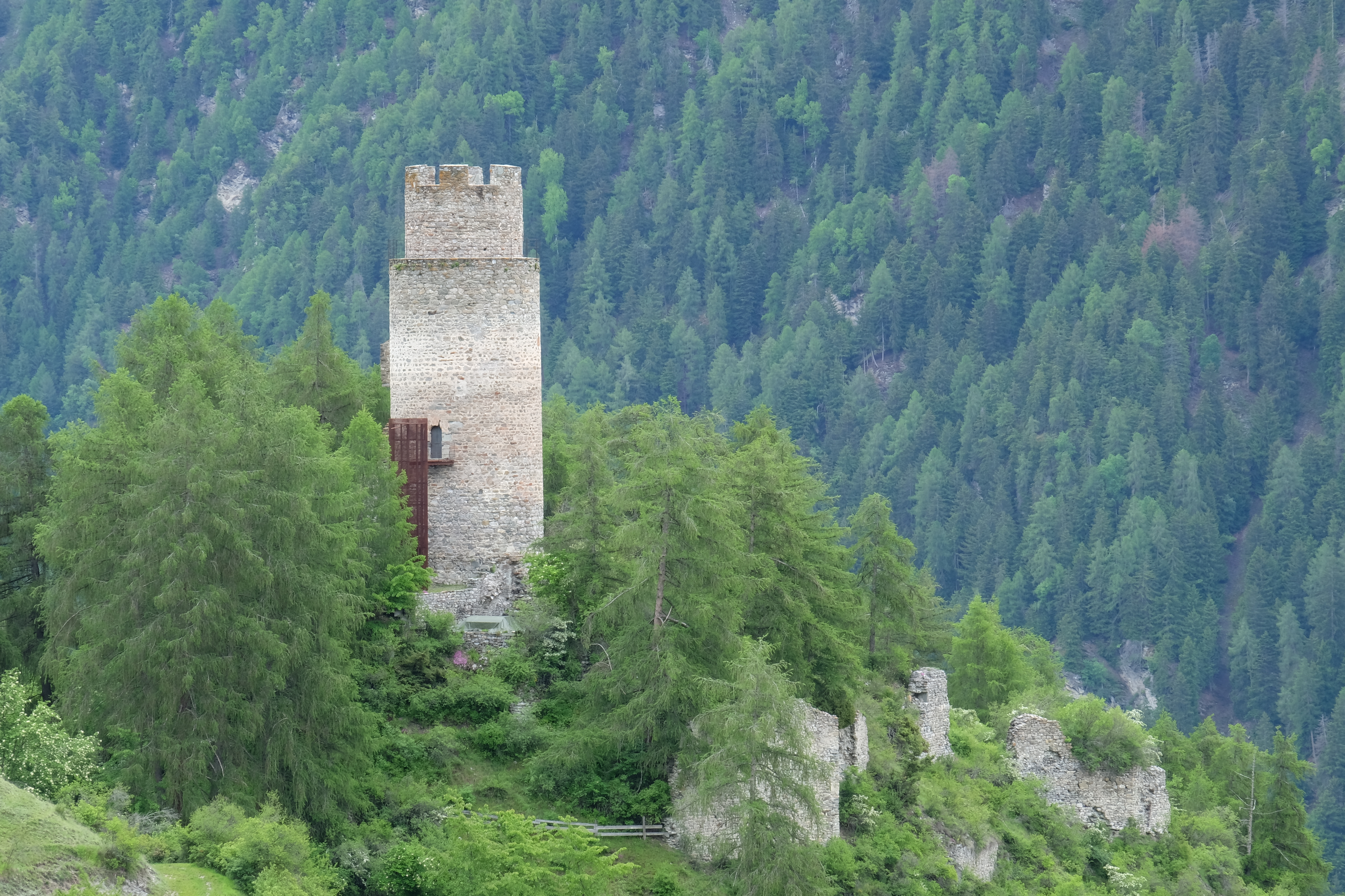 Burgruine Reichenberg (Unterreichenberg) in Taufers im Münstertal (Südtirol)